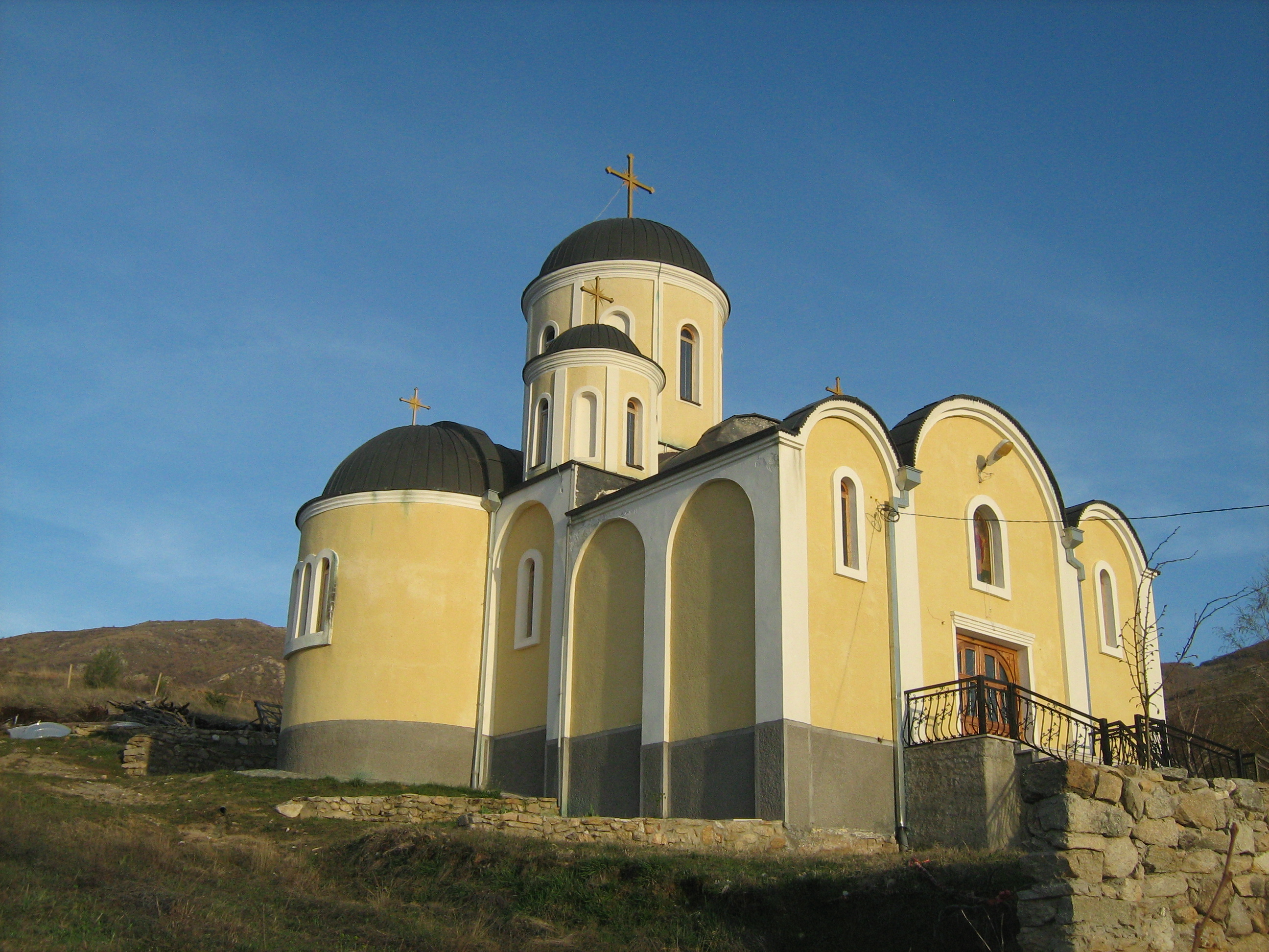 Црква Св. Петка во село Лениште Прилепско, во рамките на истоимениот манастир